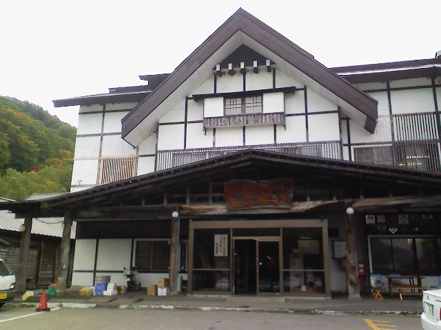 酸ヶ湯温泉旅館。Sukayu onsen, Aomori.